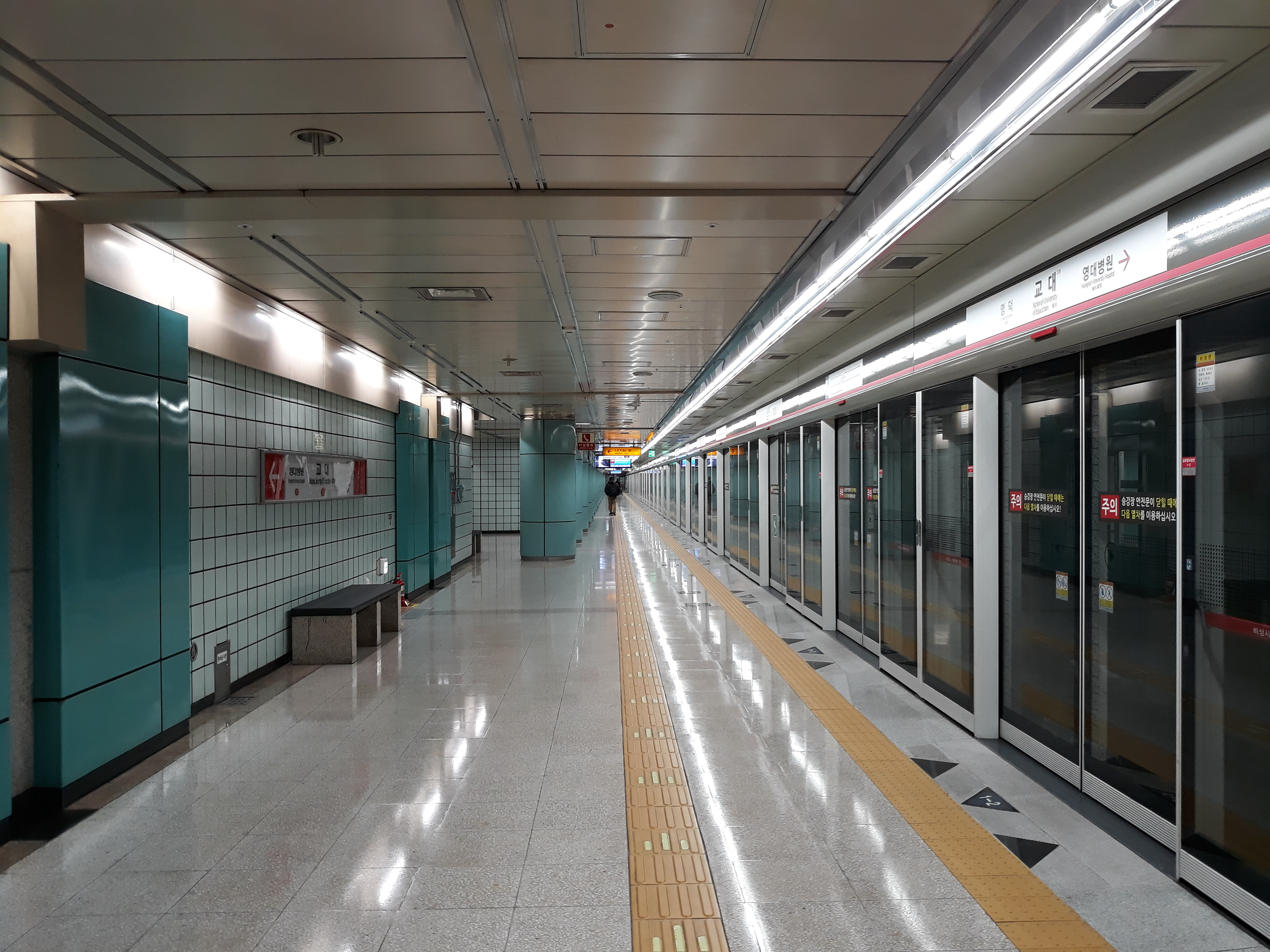 대구 도시철도 1호선 교대역 설화명곡 방면 승강장